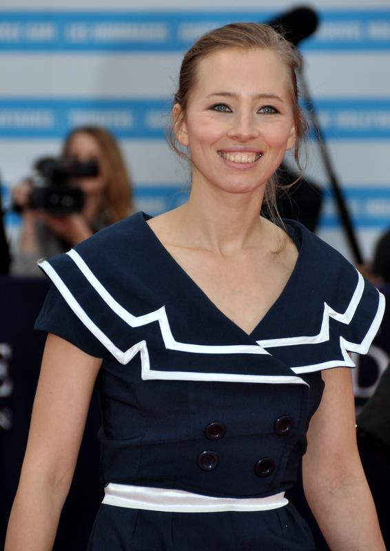 Isild Le Besco au festival de Deauville